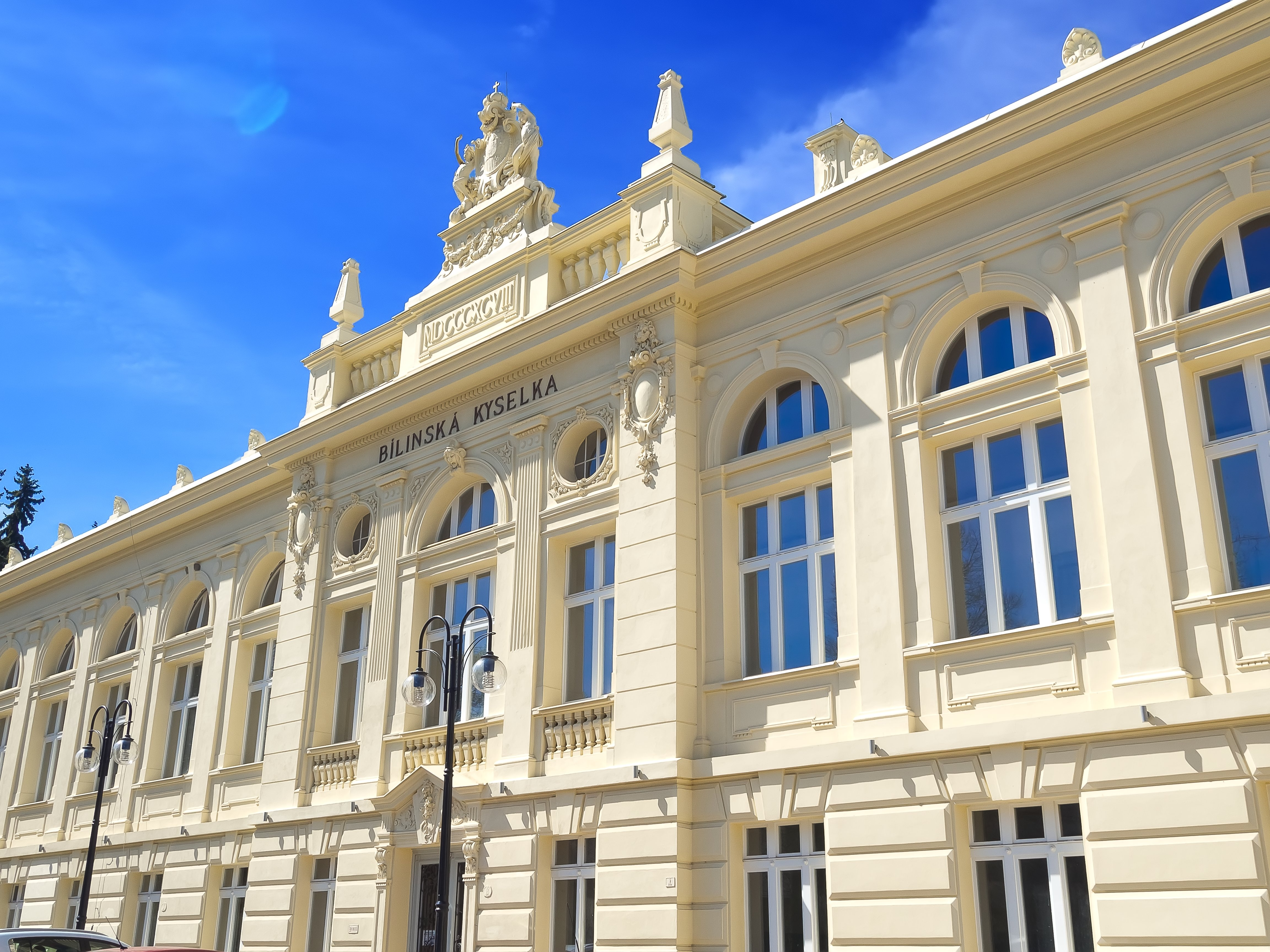 Bílinská kyselka, zřídelní budova po rekonstrukci v roce 2016